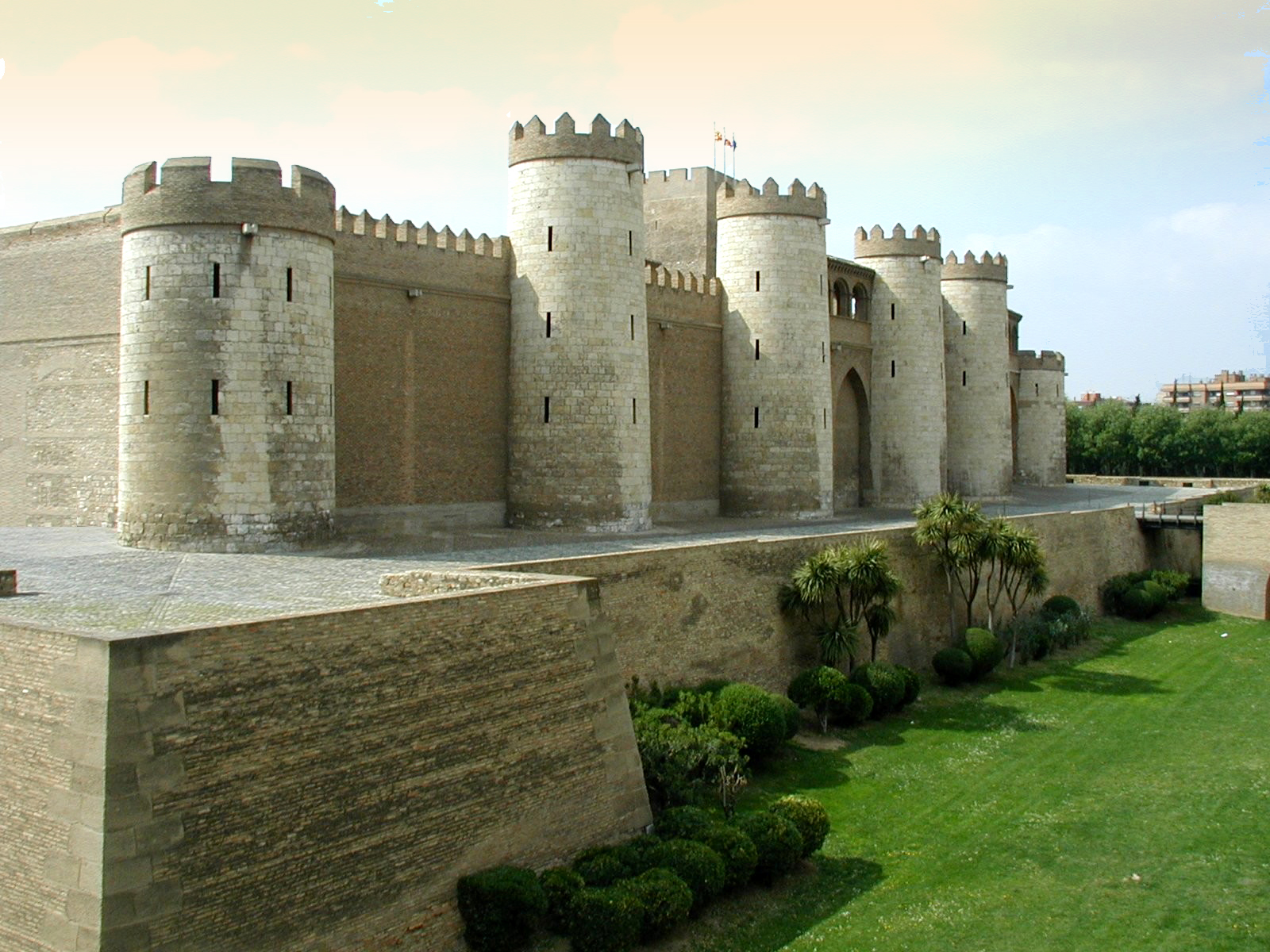 Palacio de La Aljafería, Zaragoza.